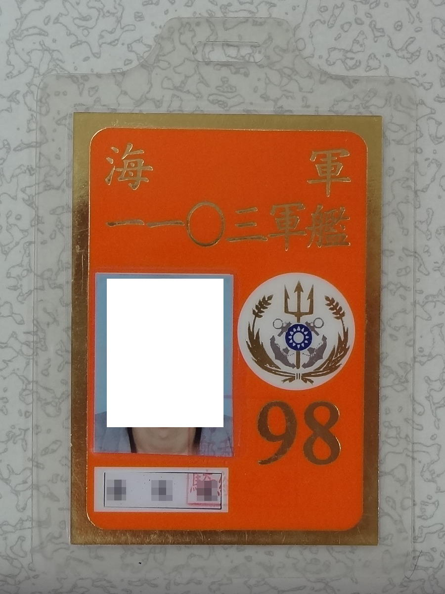 2009年中華民國海軍鄭和軍艦識別證正面，右方圓形圖案為海軍艦隊指揮部部徽。